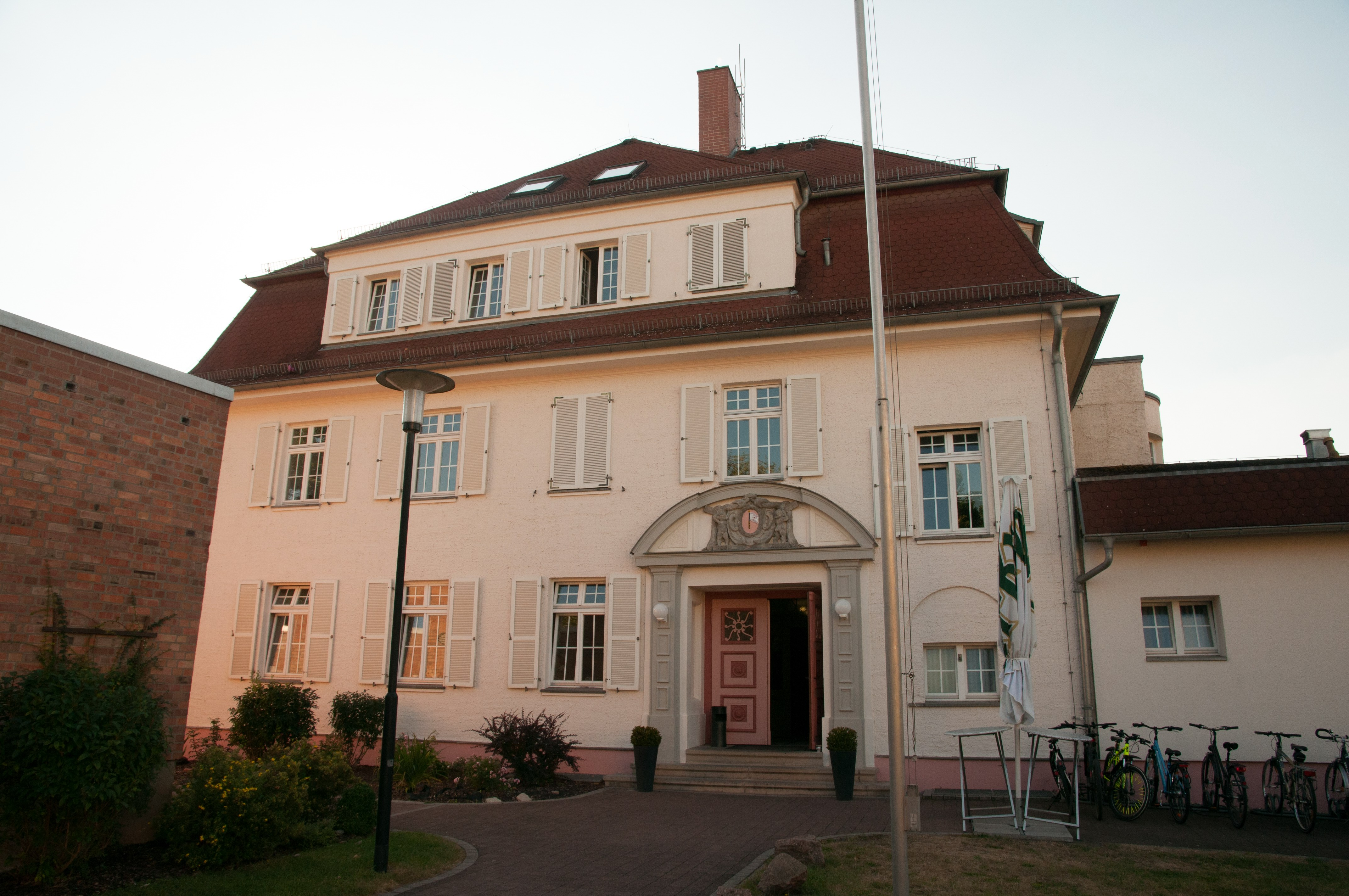 Zur Rabeninsel 23 (Ruderhaus), Halle (Saale), Böllberg